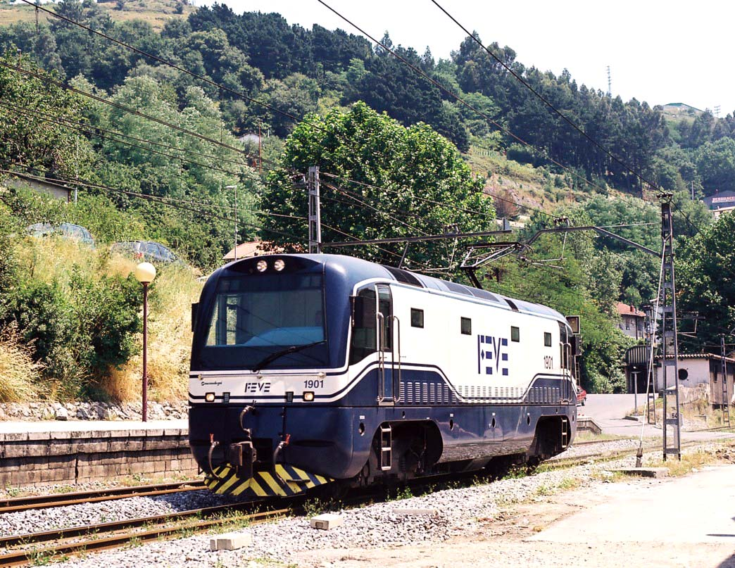 Locomotora dual 1901 de FEVE en Santa Agueda (Vizcaya)